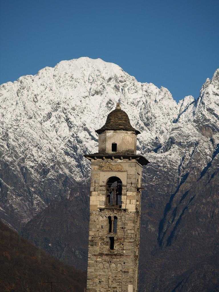 Chiesa di San Maurizio di Gravellona Toce, Piemonte, Italia